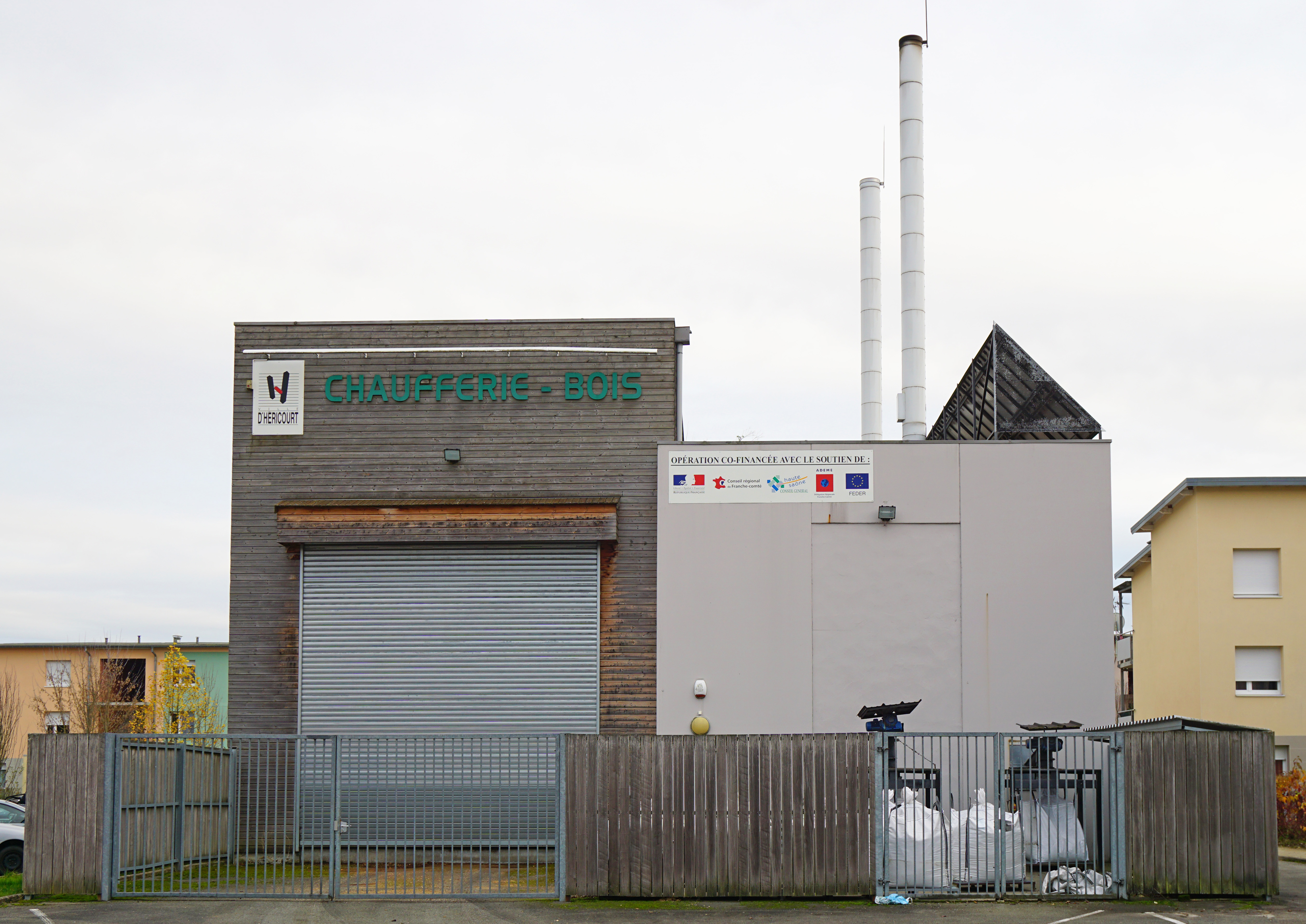 Chaufferie collective au bois à d'Héricourt (Haute-Saône).